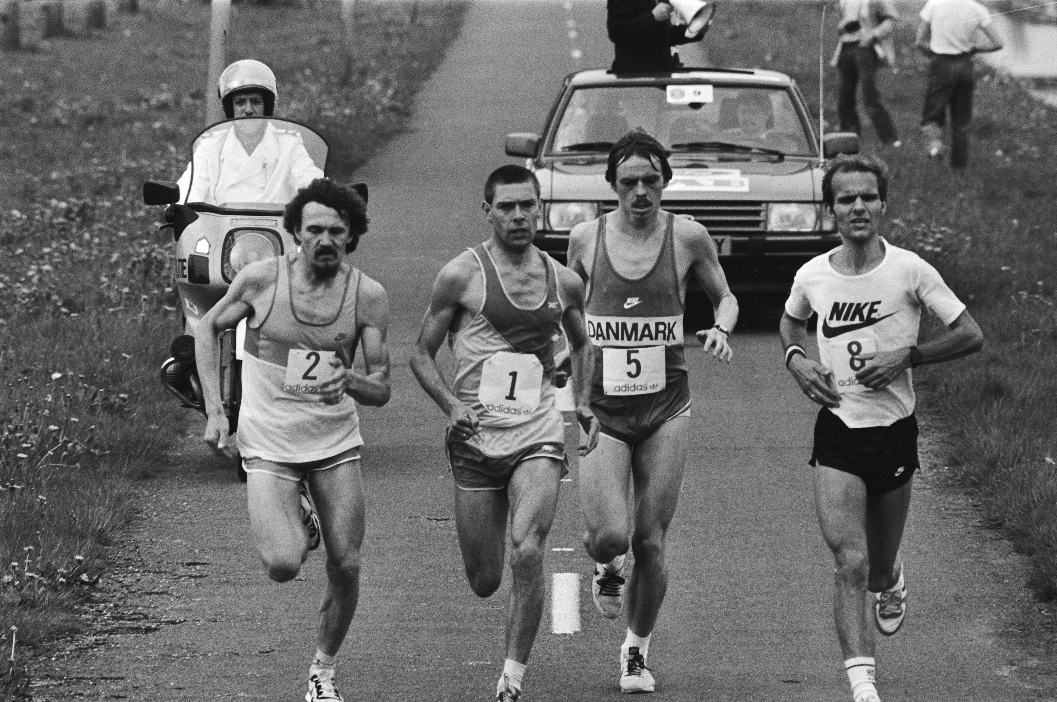 Collectie / Archief : Fotocollectie Anefo Reportage / Serie : Marathon 1983 van Amsterdam Beschrijving : marathon, hardlopen Datum : 7 mei 1983 Locatie : Amsterdam, Noord-Holland Trefwoorden : hardlopen, marathon Fotograaf : Croes, Rob C. / Anefo Auteursrechthebbende : Nationaal Archief Materiaalsoort : Negatief (zwart/wit) Nummer archiefinventaris : bekijk toegang 2.24.01.05 Bestanddeelnummer : 932-5842